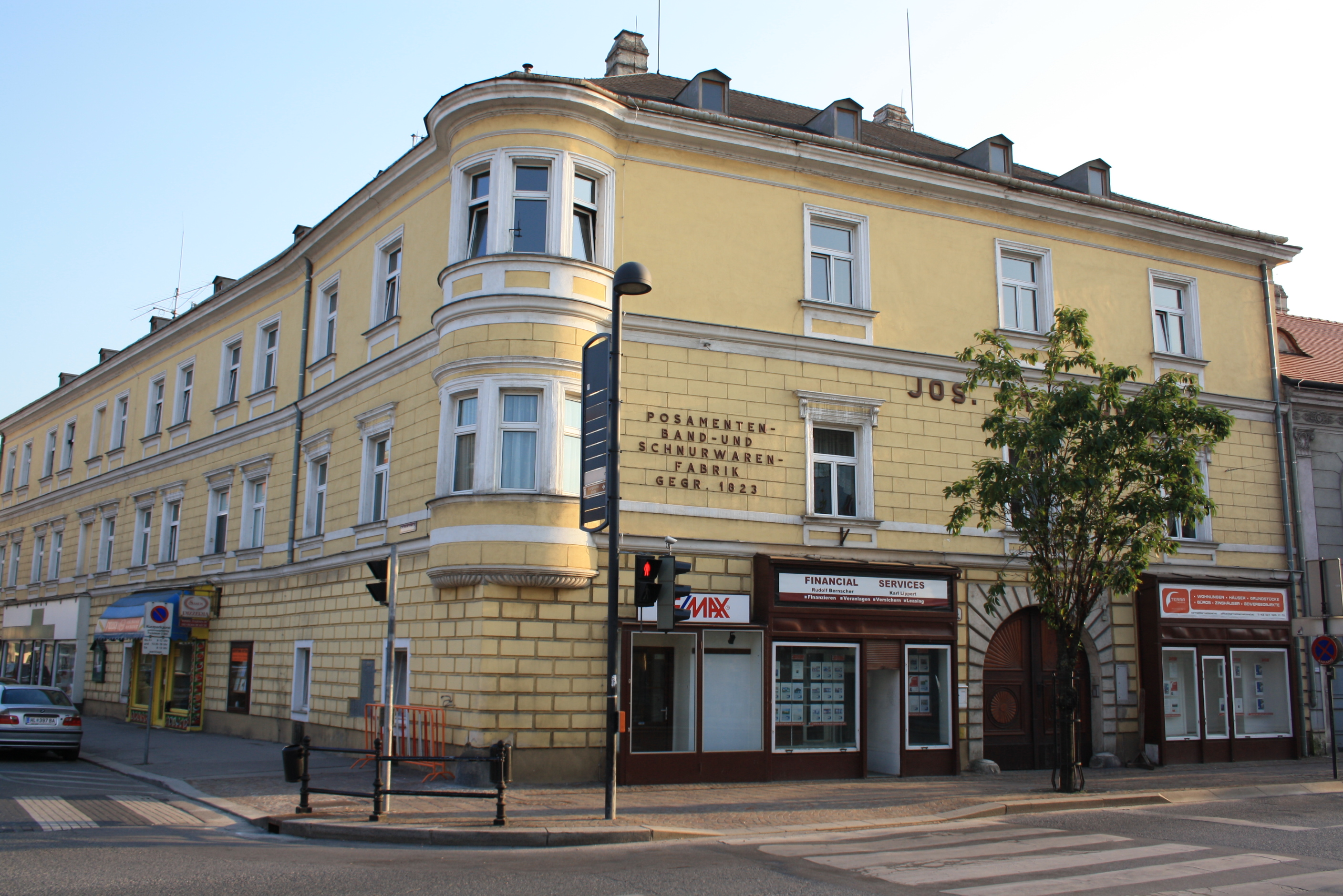 Wohn- und Geschäftshaus, Stefsky-Haus, Hauptstraße 14, Stockerau